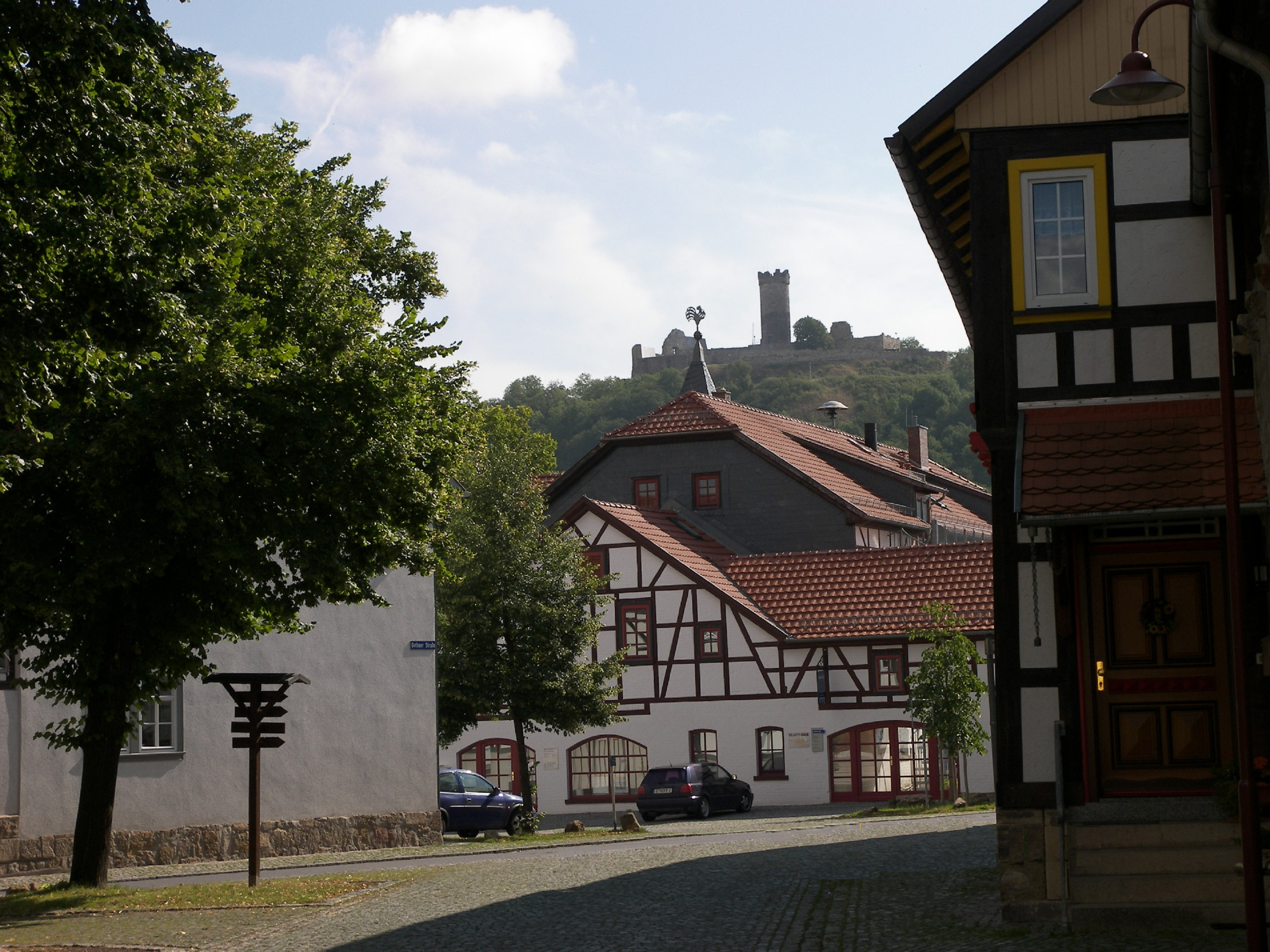 Mühlberg, Ortsinneres